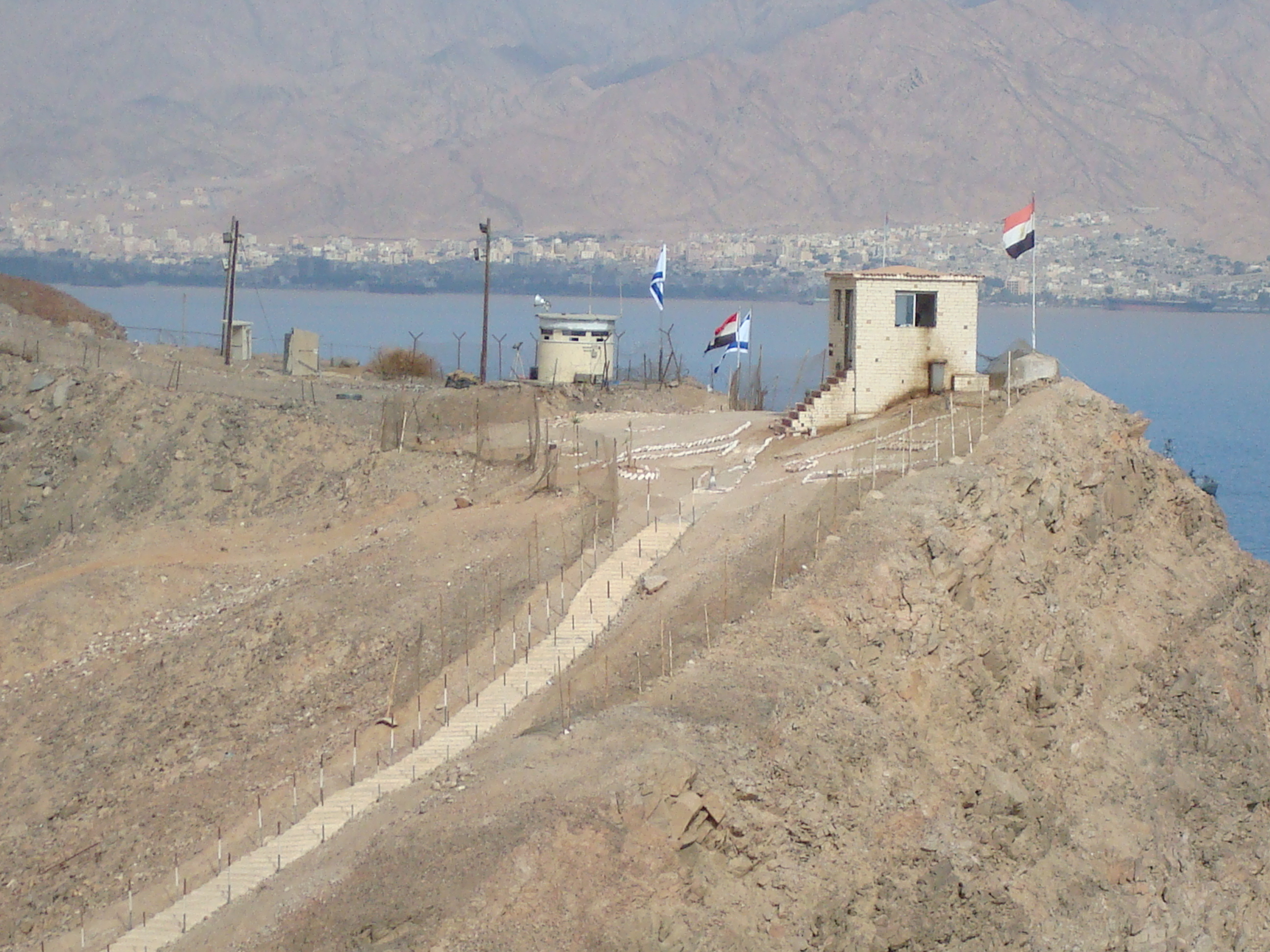 الحدود بين مصر وإسرائيل